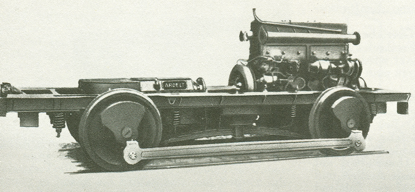 Antriebsdrehgestell des NBE T 3 mit Ardelt-Getriebe